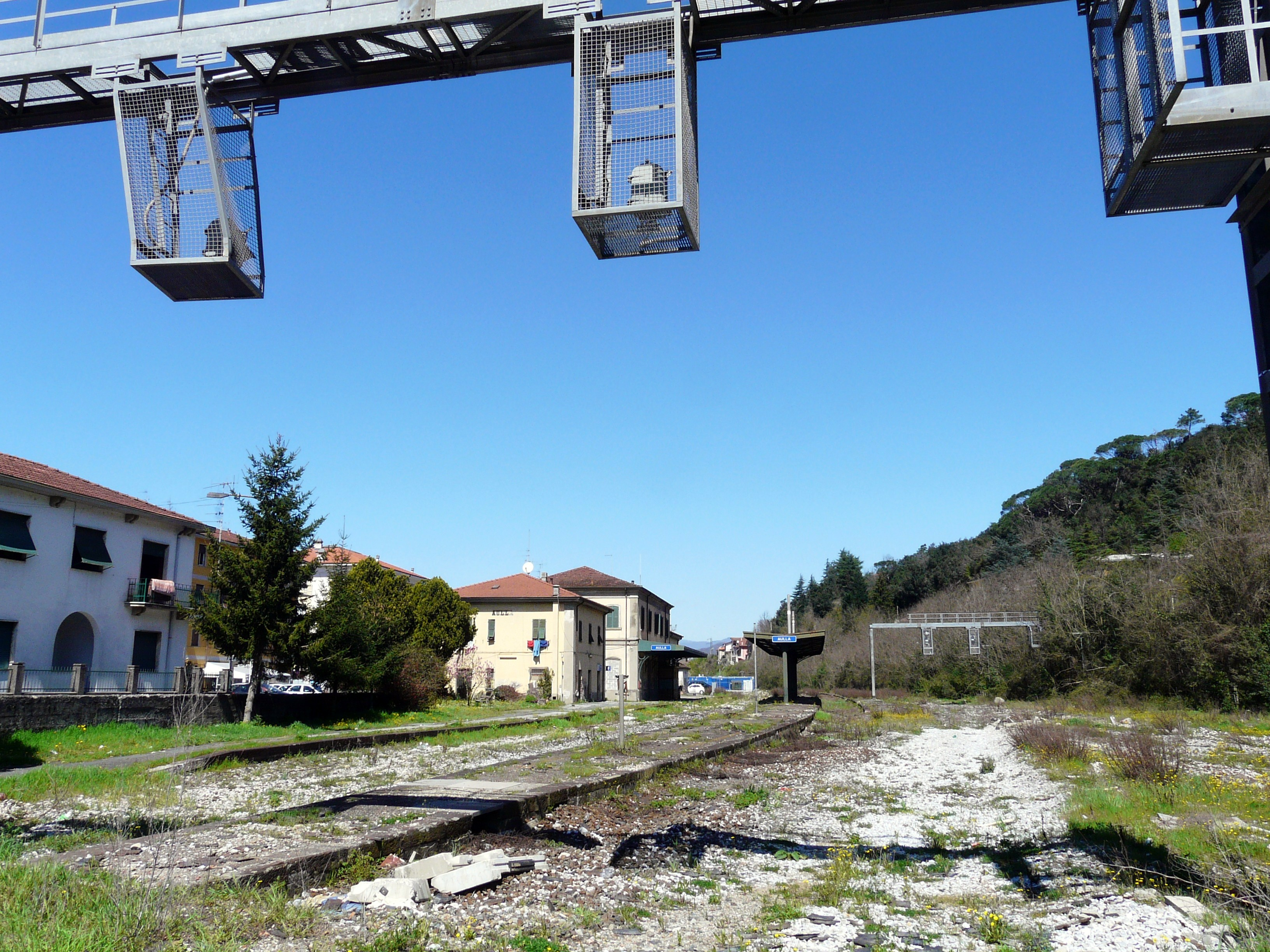 Vecchia stazione ferroviaria di Aulla, Toscana, Italia